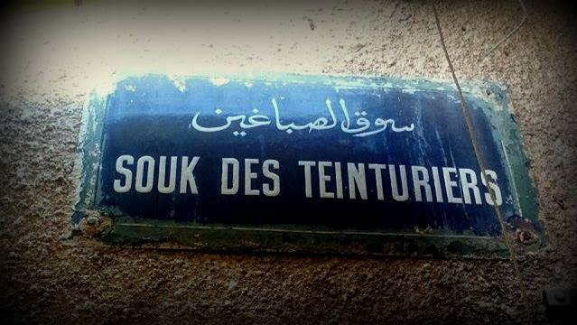 plaque métallique a l"entrée de Souk Des Teinturiers